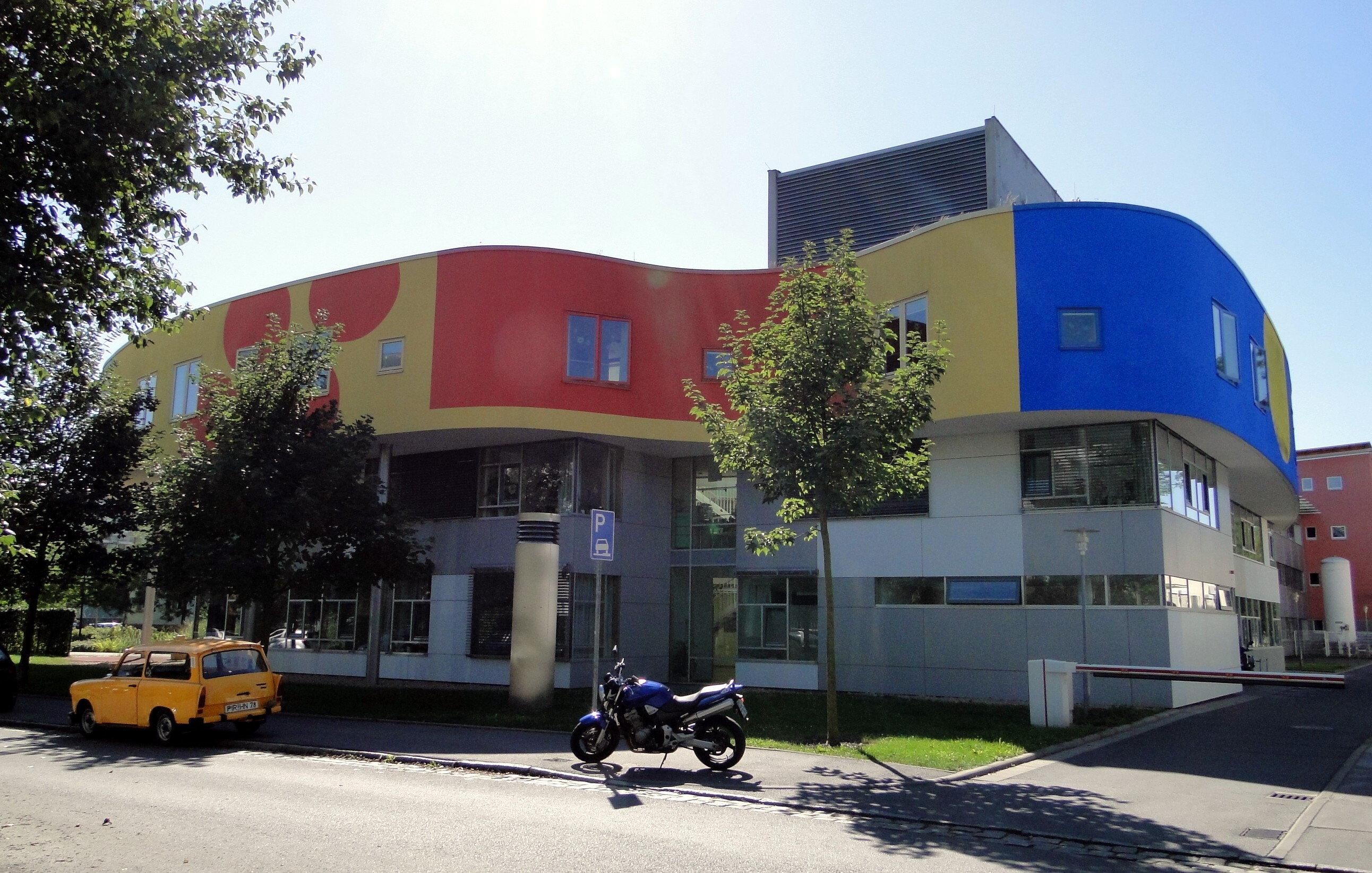 Mildred-Scheel-Haus, Erweiterungsbau, des Universitätsklinikums in Dresden